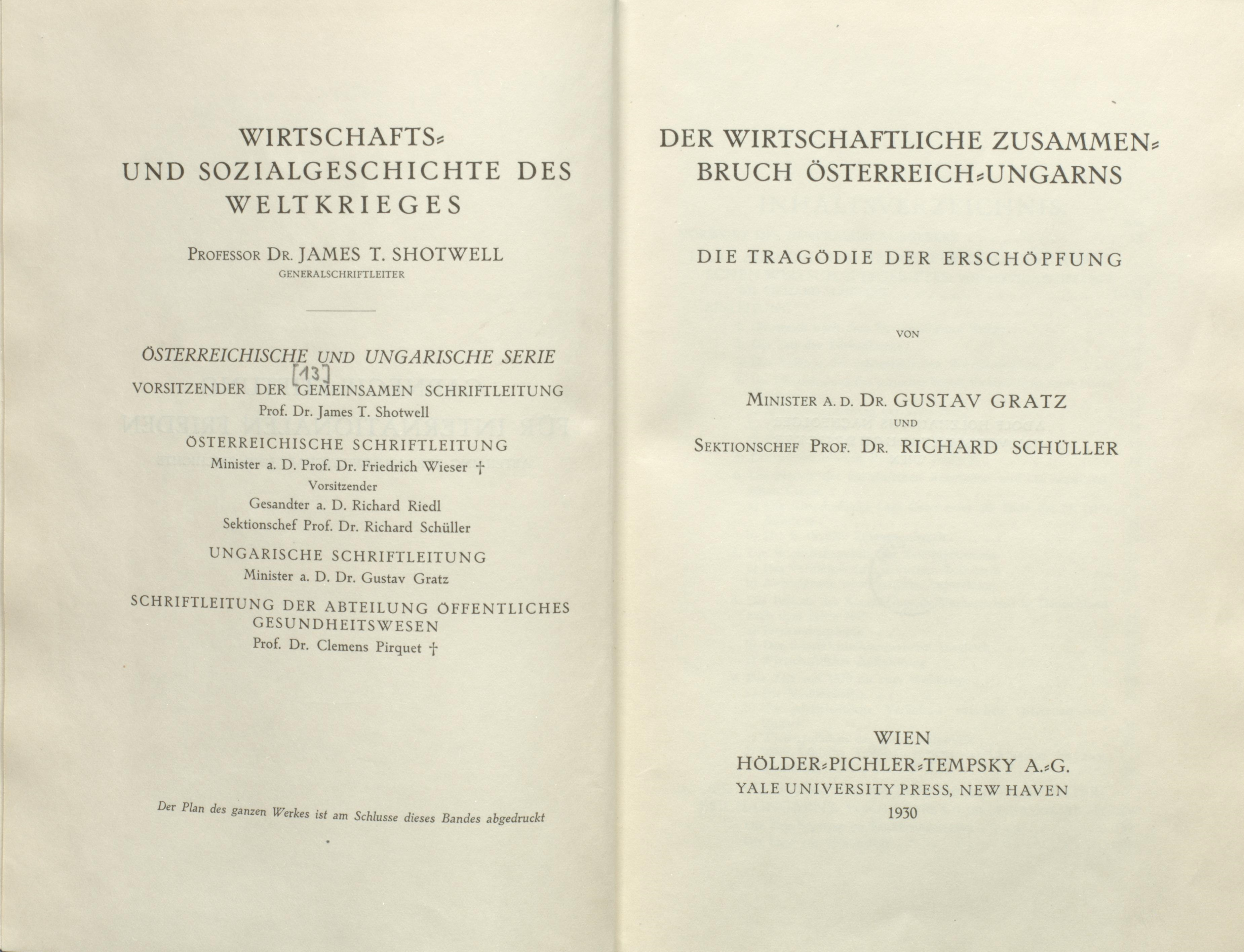 Gusztáv Gratz Richard Schüller Der wirtschaftliche Zusammenbruch Österreich-Ungarns 1930 Titel